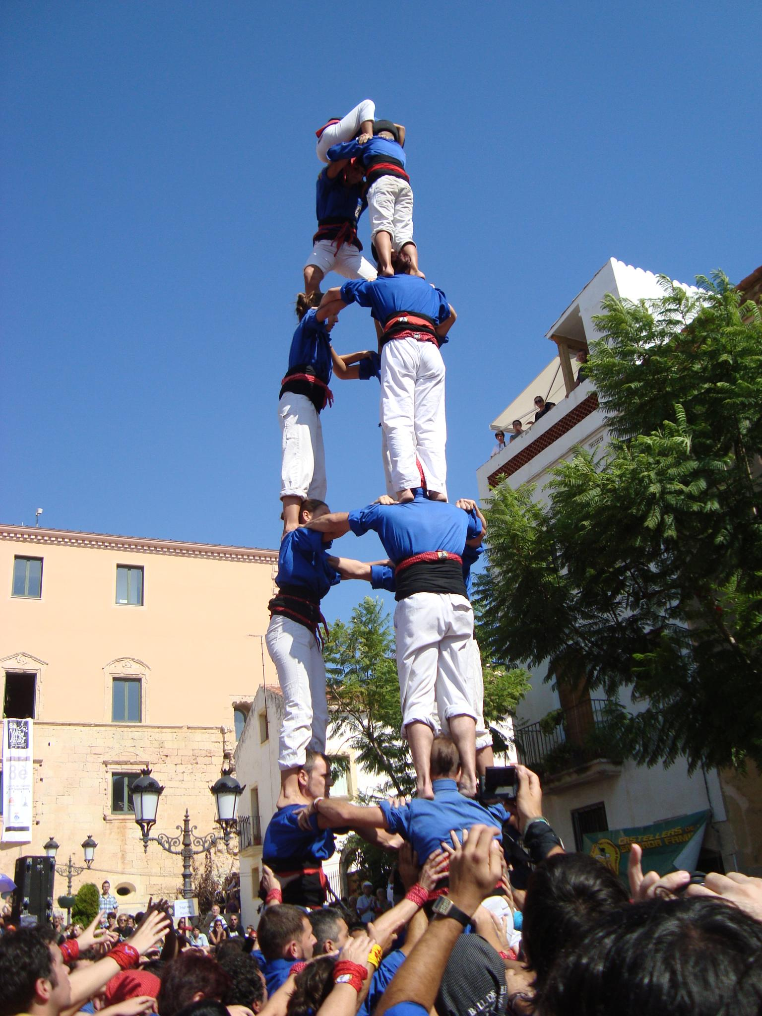 3de7ps dels Castellers d'Esplugues al Concur7 2011